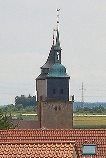 Schiefer Nordturm der Bartholomäuskirche Markgröningen